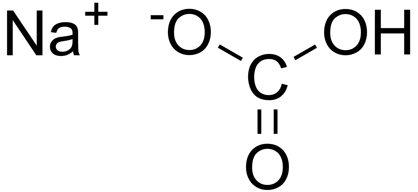 Structure of Sodium bicarbonate